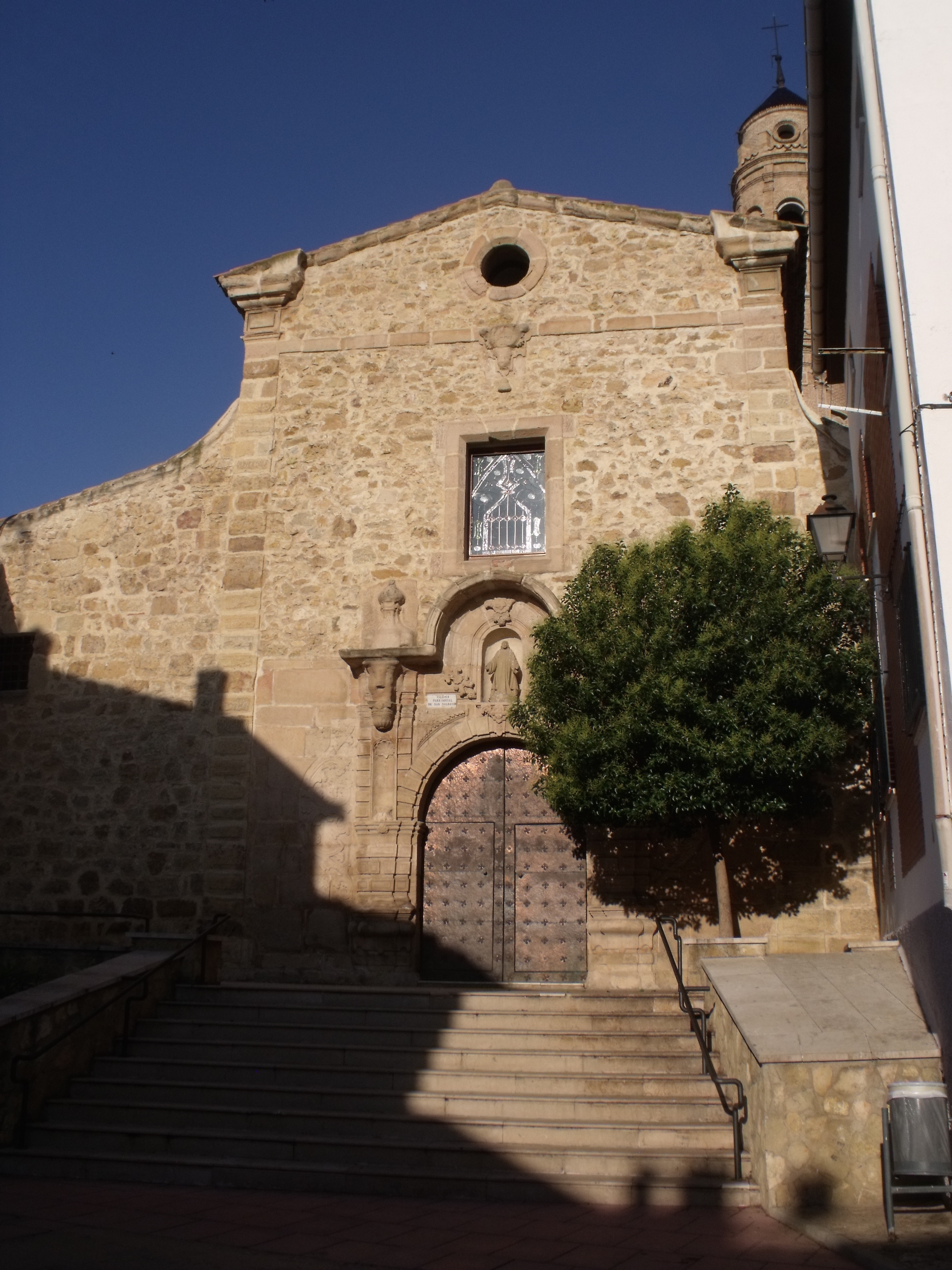 Ariño (Teruel).